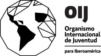 NAda nada